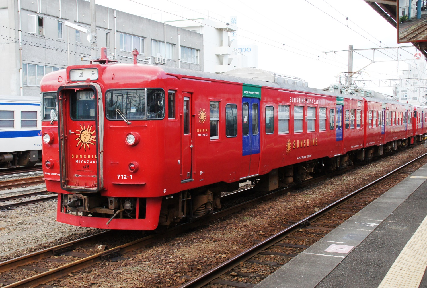 0番台へ改造された後の姿、パンタグラフ交換前